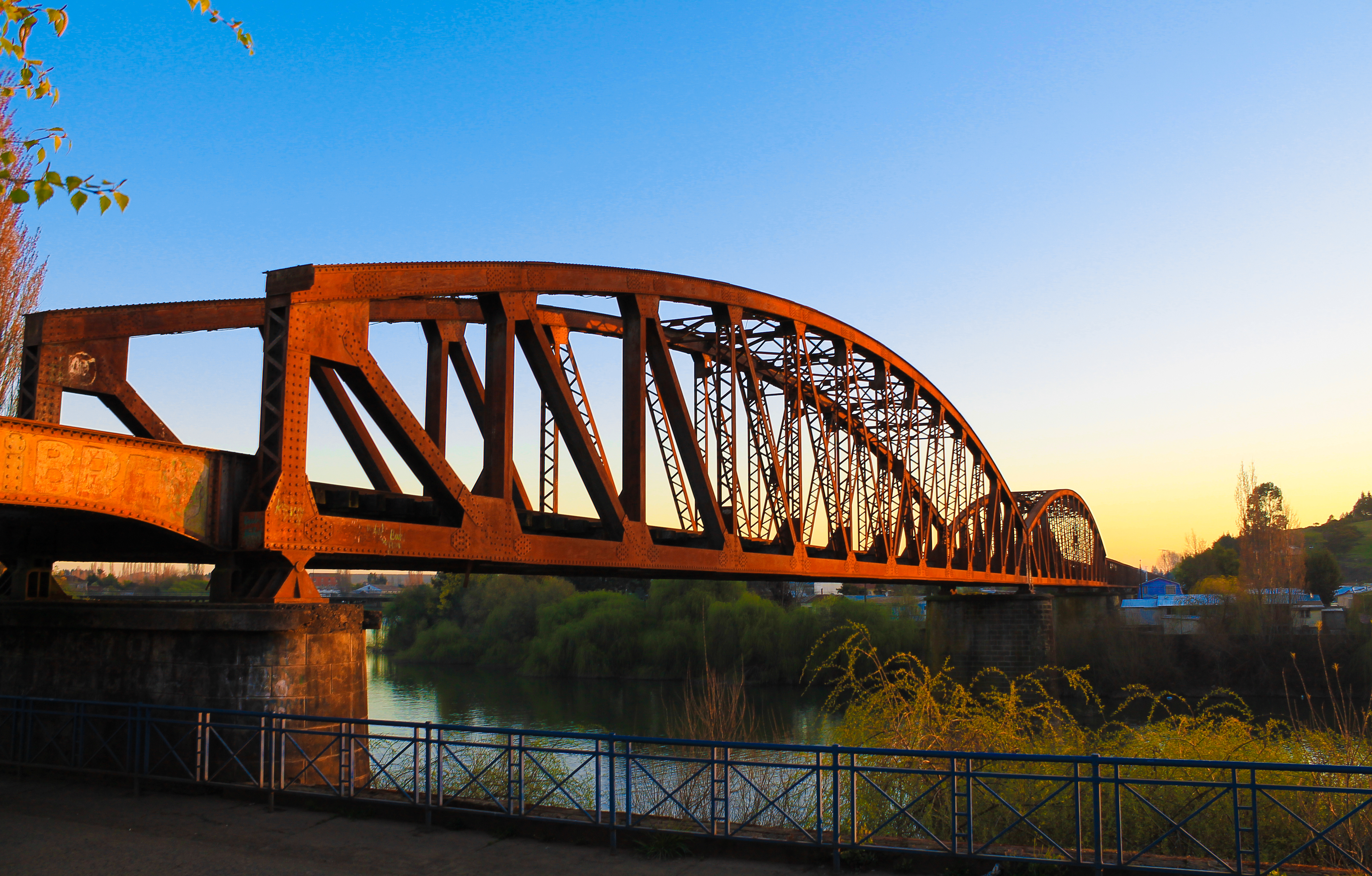 Puente ferroviario sobre el río Chol Chol, fotografiado una bella tarde de septiembre. This is a photo of a national monument in Chile: 2054